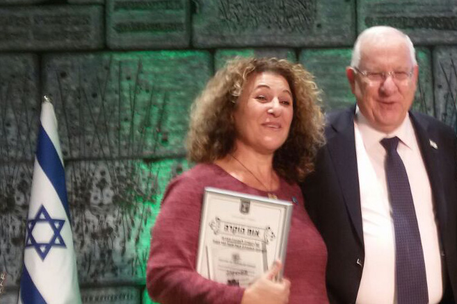 מכי חכם נאמן והנשיא ראובן ריבלין בעת קבלת אות הוקרה של השרה לשוויון חברתי בתחום המאבק באלימות נגד נשים.